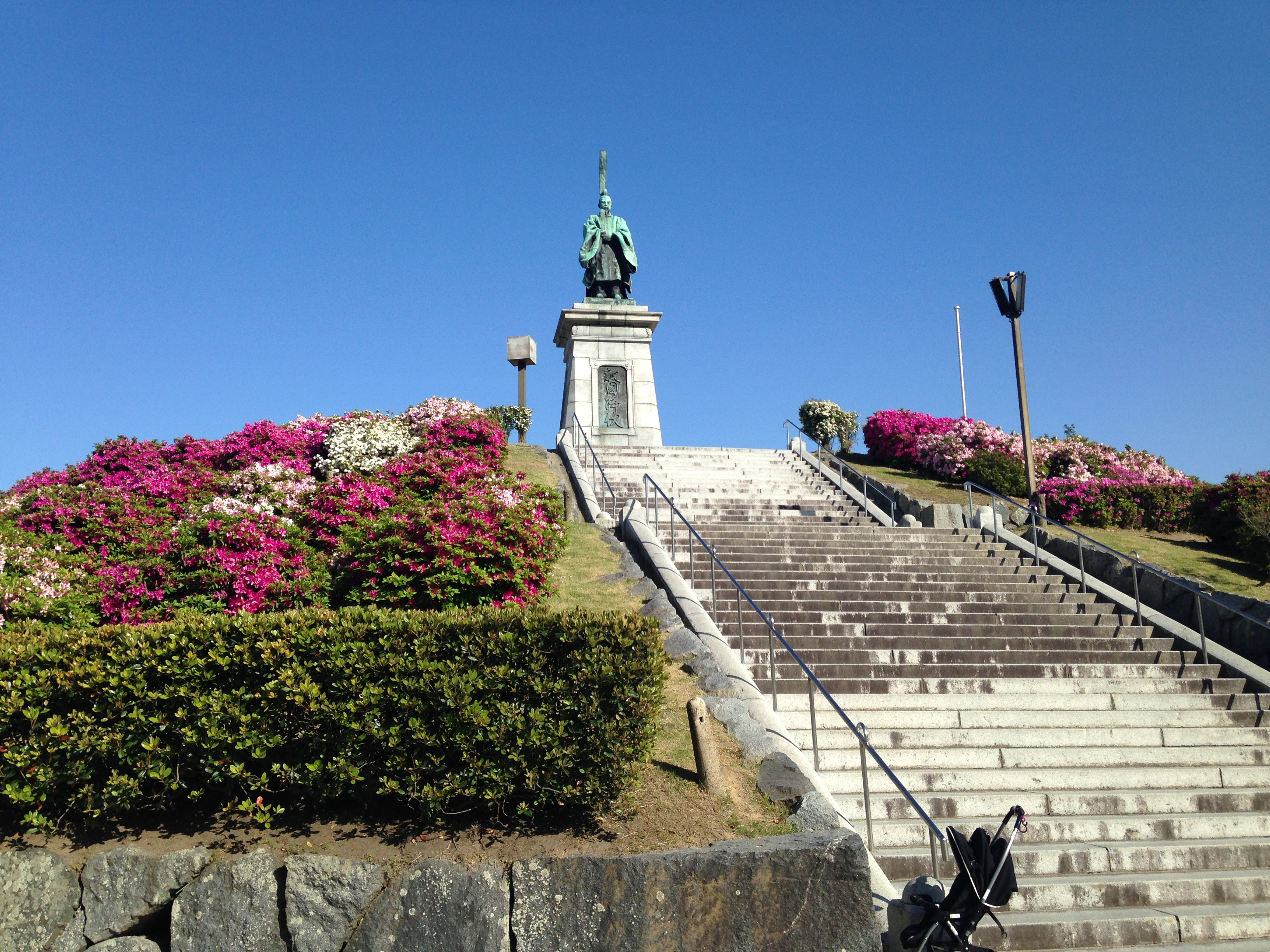 福岡市東公園の亀山上皇像